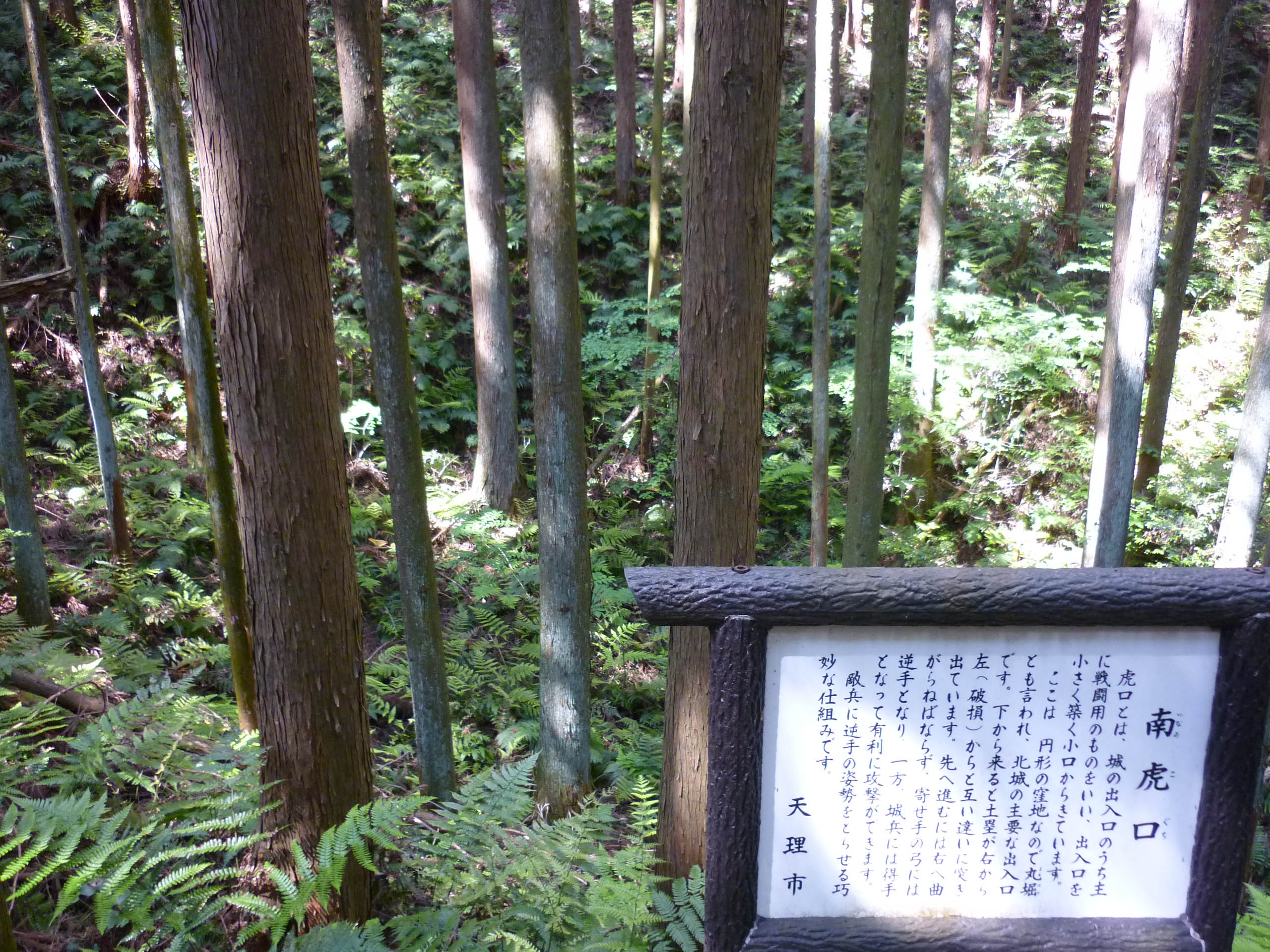 南虎口跡